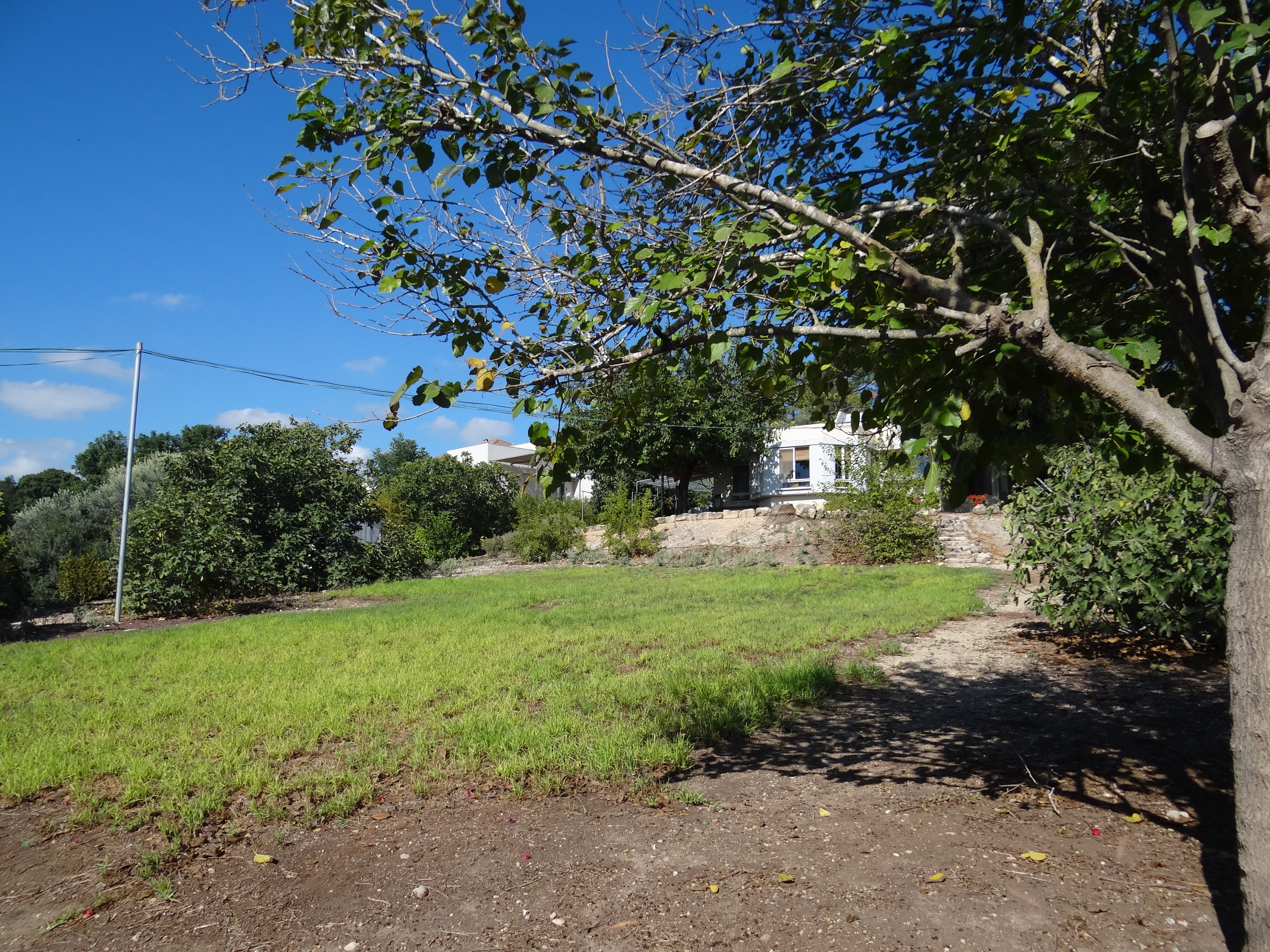 מבנים בבית זייד